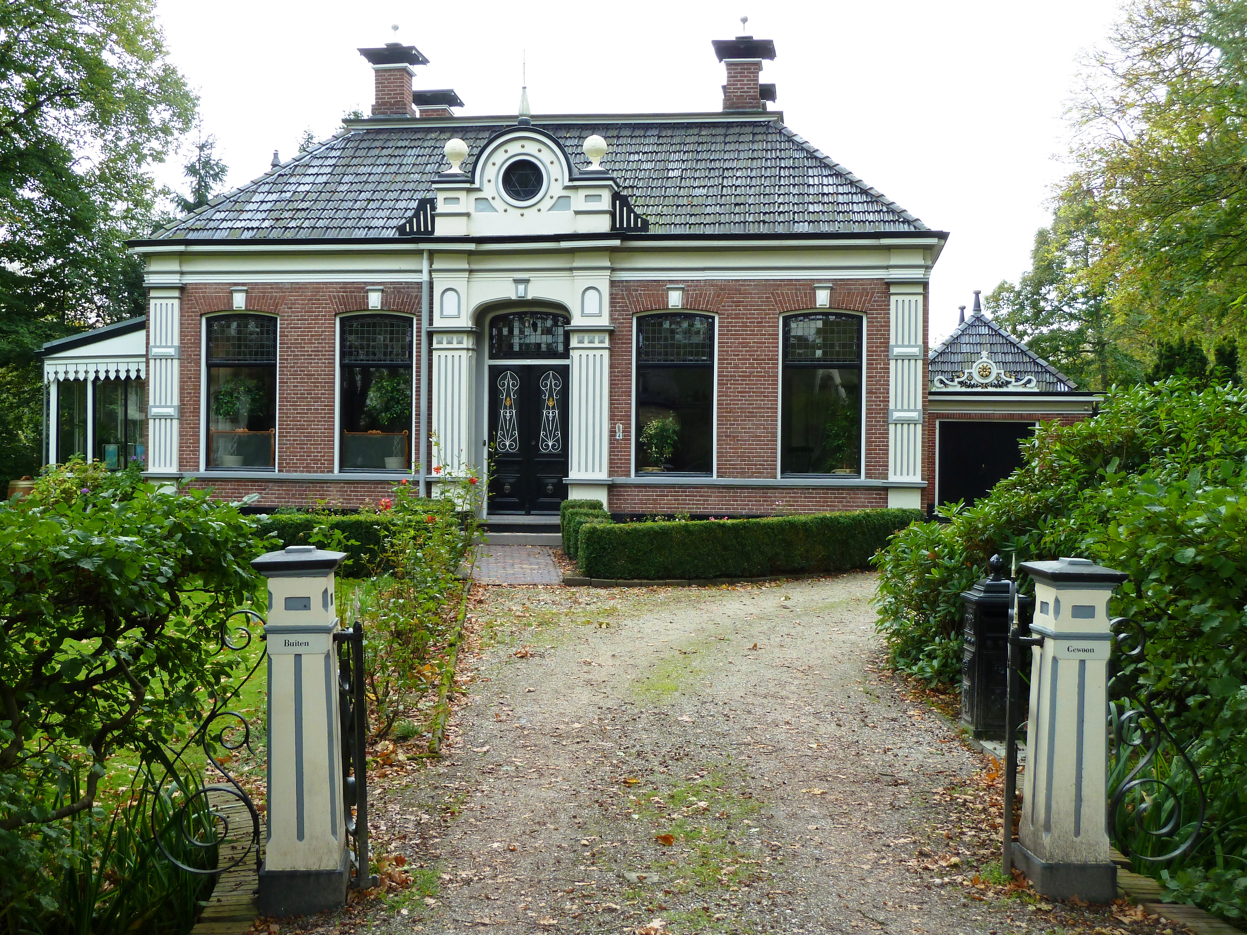 De Gast 4 in het Groningse dorp Zuidhorn. Gebouwd als rentenierswoning (dwarshuis) met aangebouwd koetshuis rond 1890 in eclectische stijl, naar ontwerp van architect M. Viets, die het voor zichzelf zou hebben gebouwd. In 1947 werd een slaapkamer afgetimmerd op zolder en een dakkapel geplaatst in het dakvlak van de achtergevel. In 1978 zijn op zolder nog een aantal slaapkamers afgetimmerd.